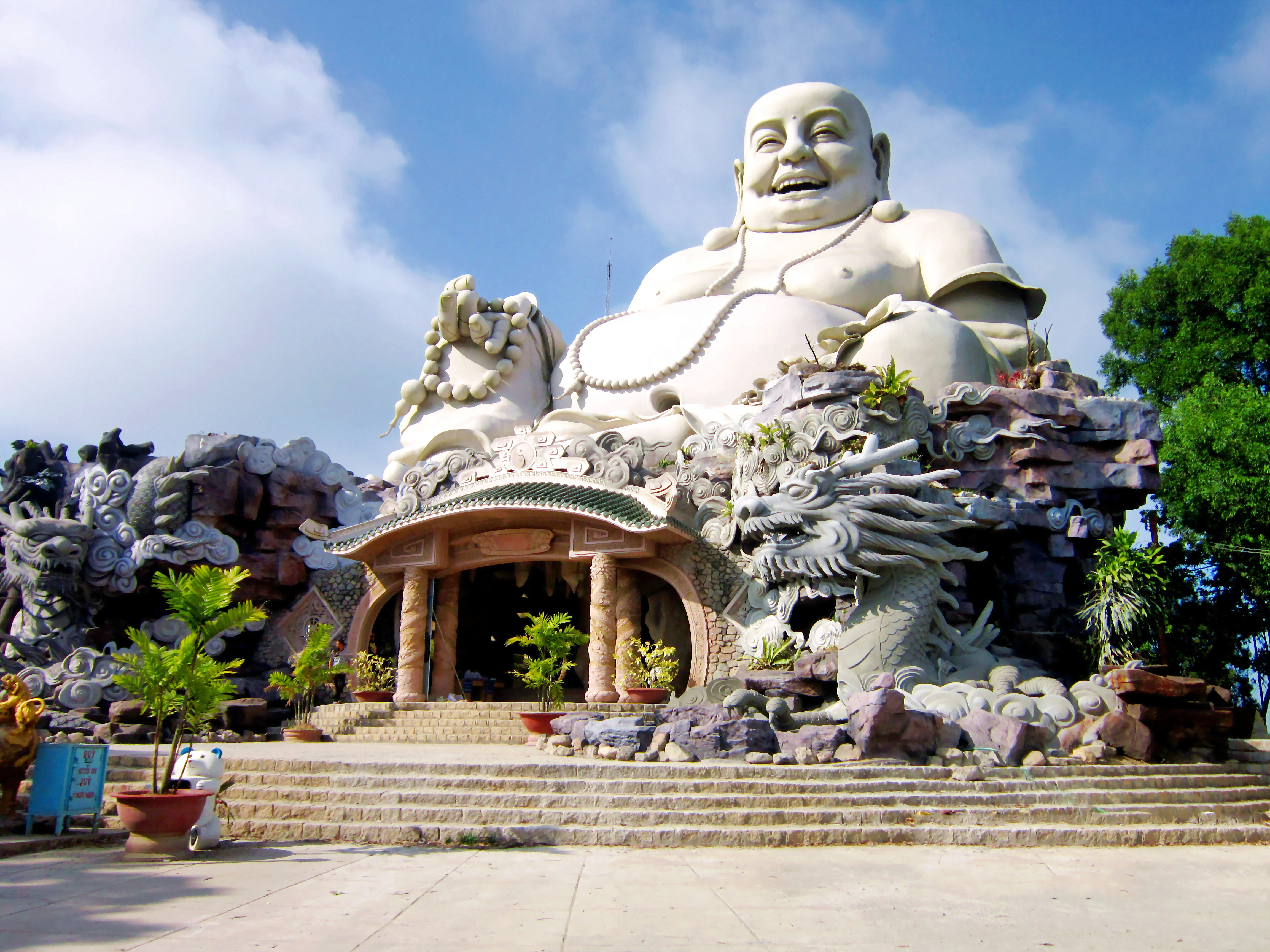 Tượng Phật Di Lặc trên đỉnh núi Cấm; thuộc huyện Tịnh Biên, An Giang, Việt Nam.